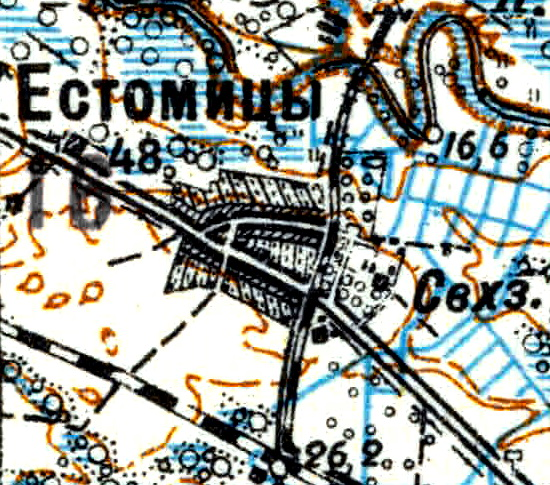 Топографическая карта Ленинградской области, квадрат Vc-29 (Батецкая), деревня Естомичи